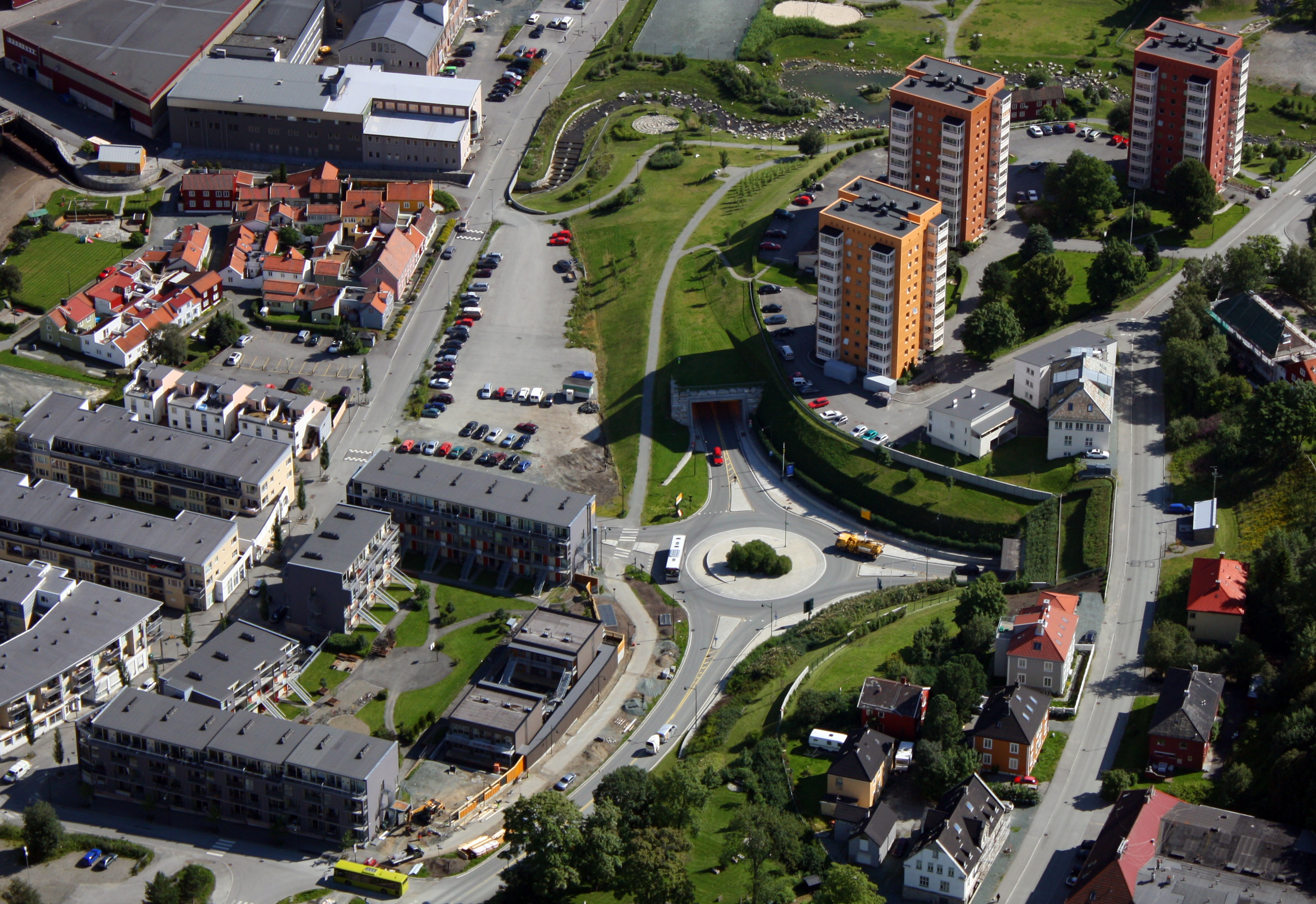 Nordre avlastningsveg i Ila